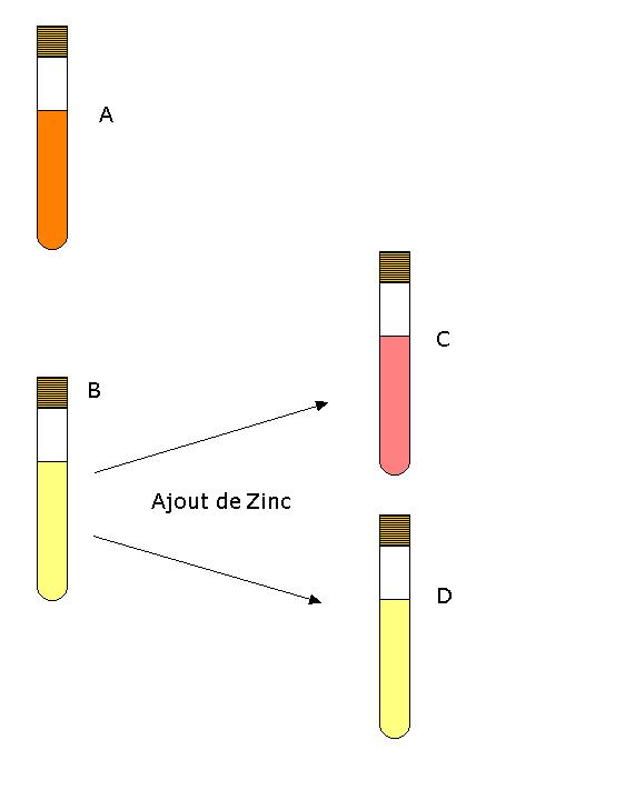 créé le 17/08/2006 par alpha.prim